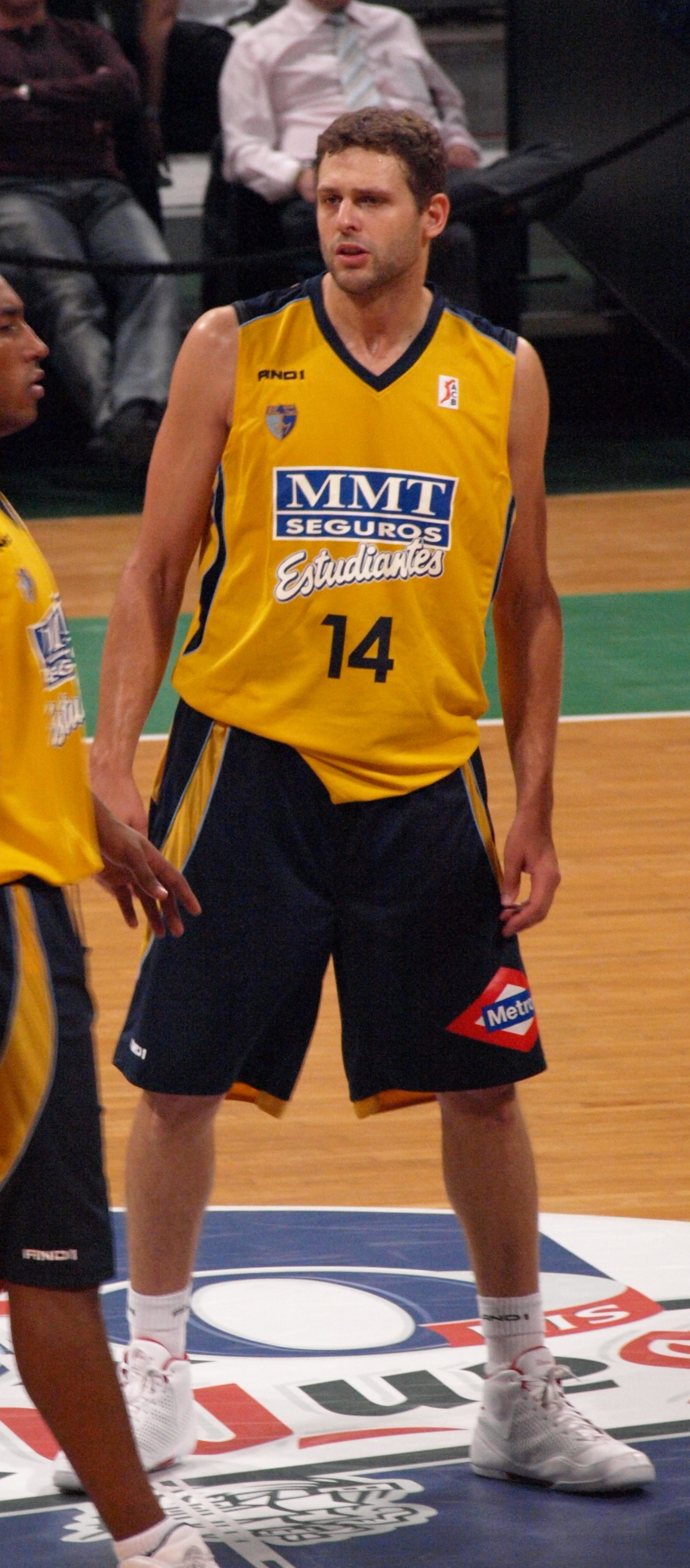 Hernán Jasen durante la disputa del partido de la segunda jornada de la liga ACB 2008-09 que enfrentó al Estudiantes y al DKV Joventut en el Olímpico de Badalona.